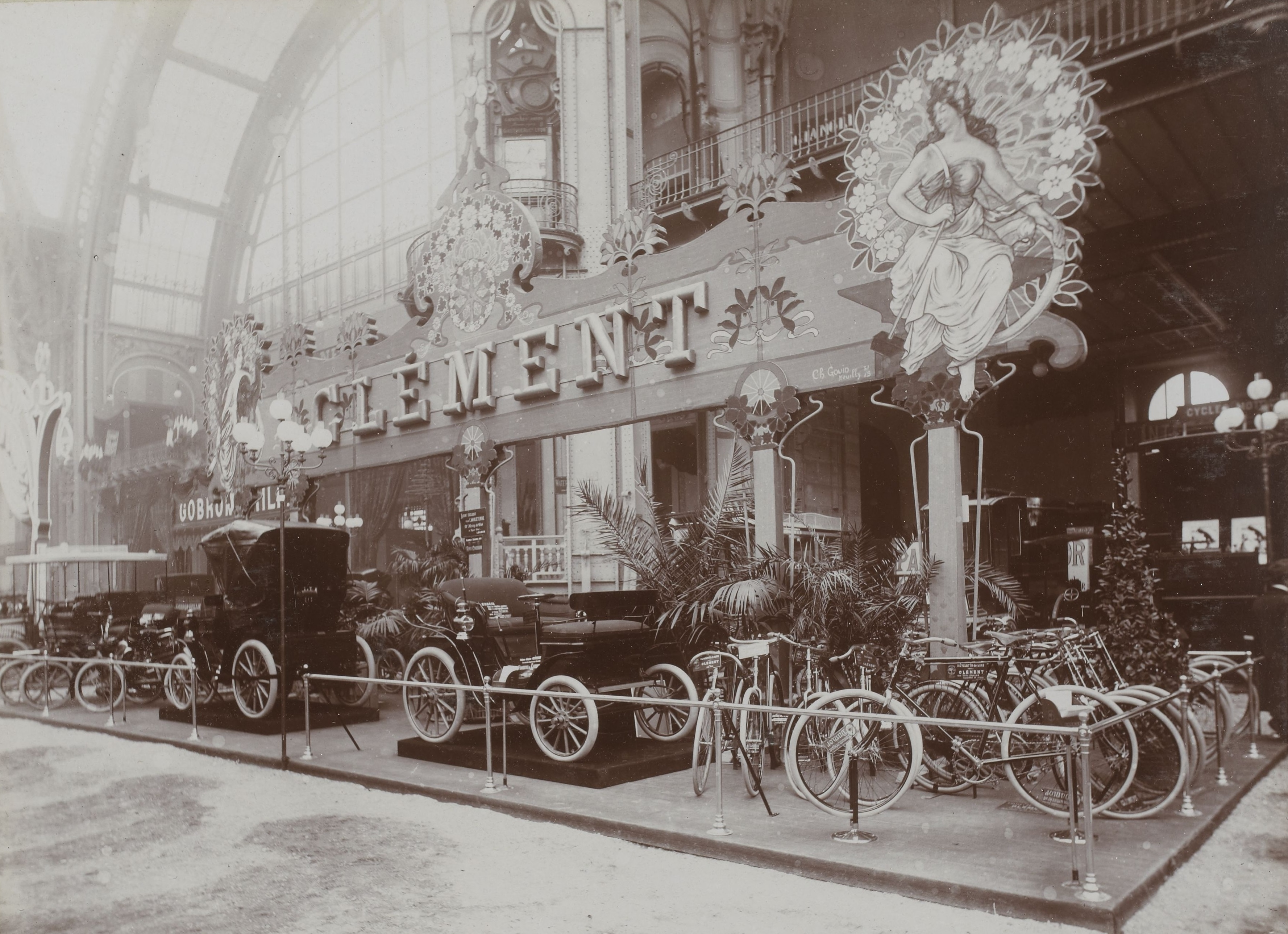 [Collection Jules Beau. Photographie sportive] : T. 15. Année 1901 / Jules Beau : F. 6v. [Salon de l' Automobile, du cycle et des sports, 25 janvier - 10 février 1901]